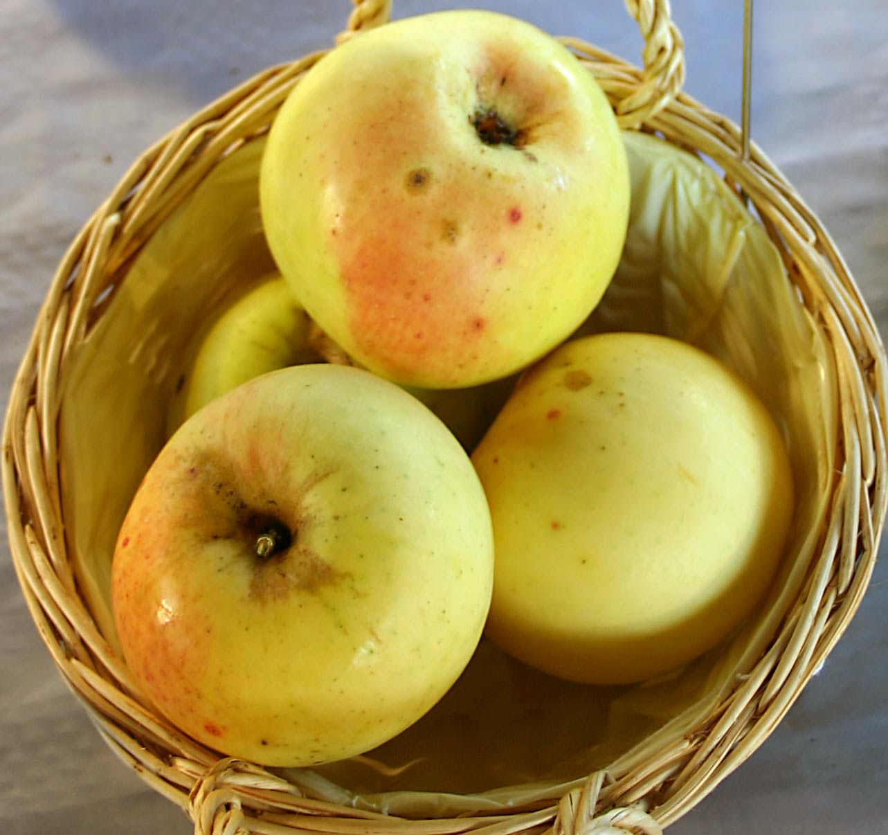 Malus "Croncels" (Büdingen) details : Transparente de Croncels